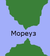 Мореуз